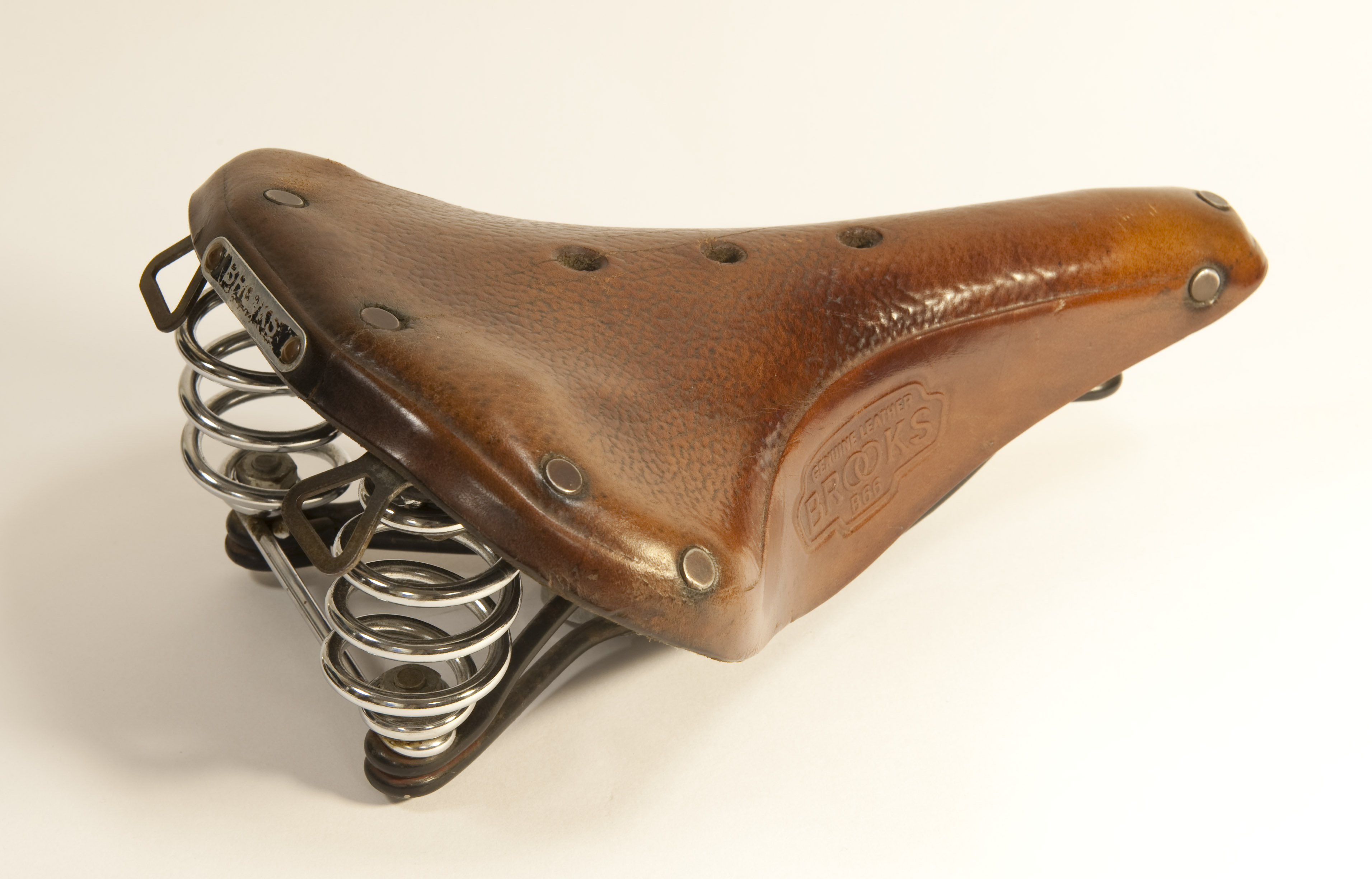 Saddle - Brooks B66